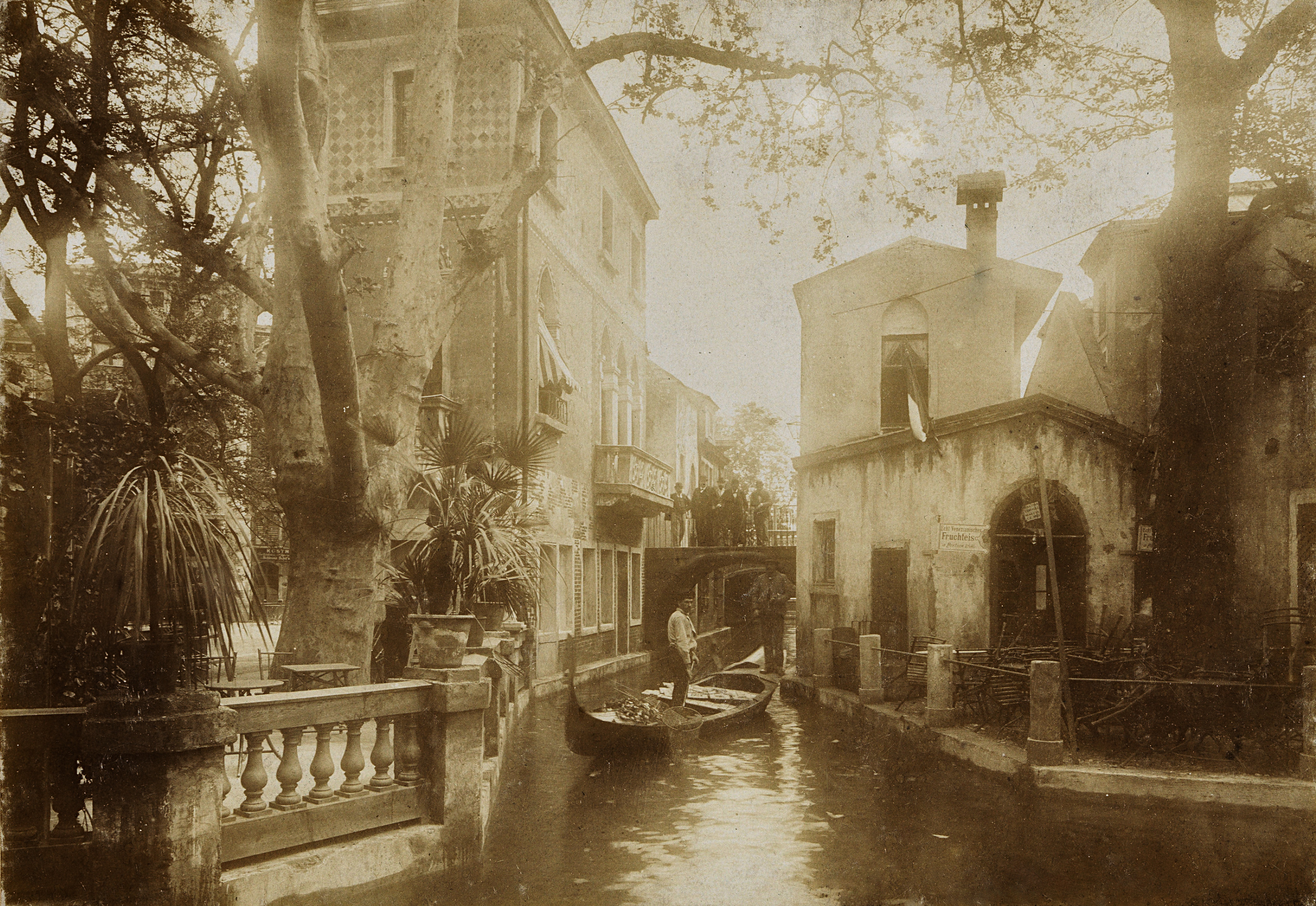 Themenpark "Venedig in Wien" im Wiener Prater, 1895